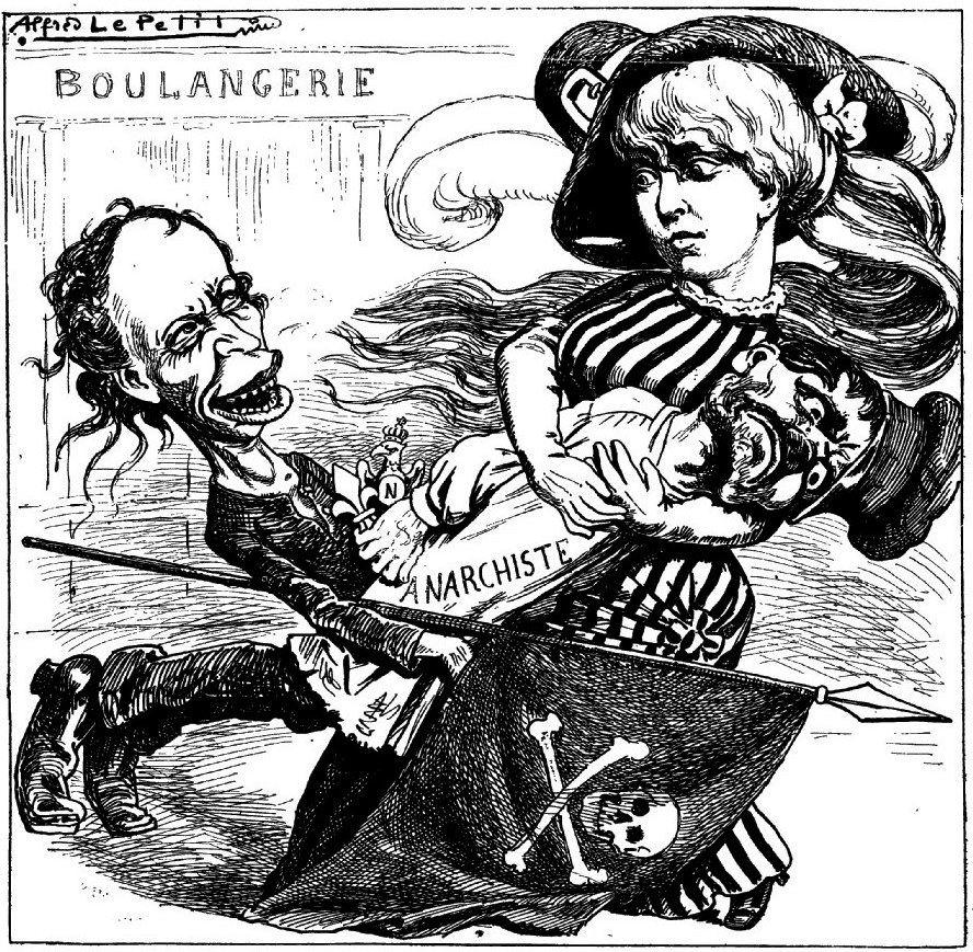 "Engueulade de la vierge rouge, Mlle Louise Michel [...] et de la vierge rose, Mlle Foiret d'Erlincourt".